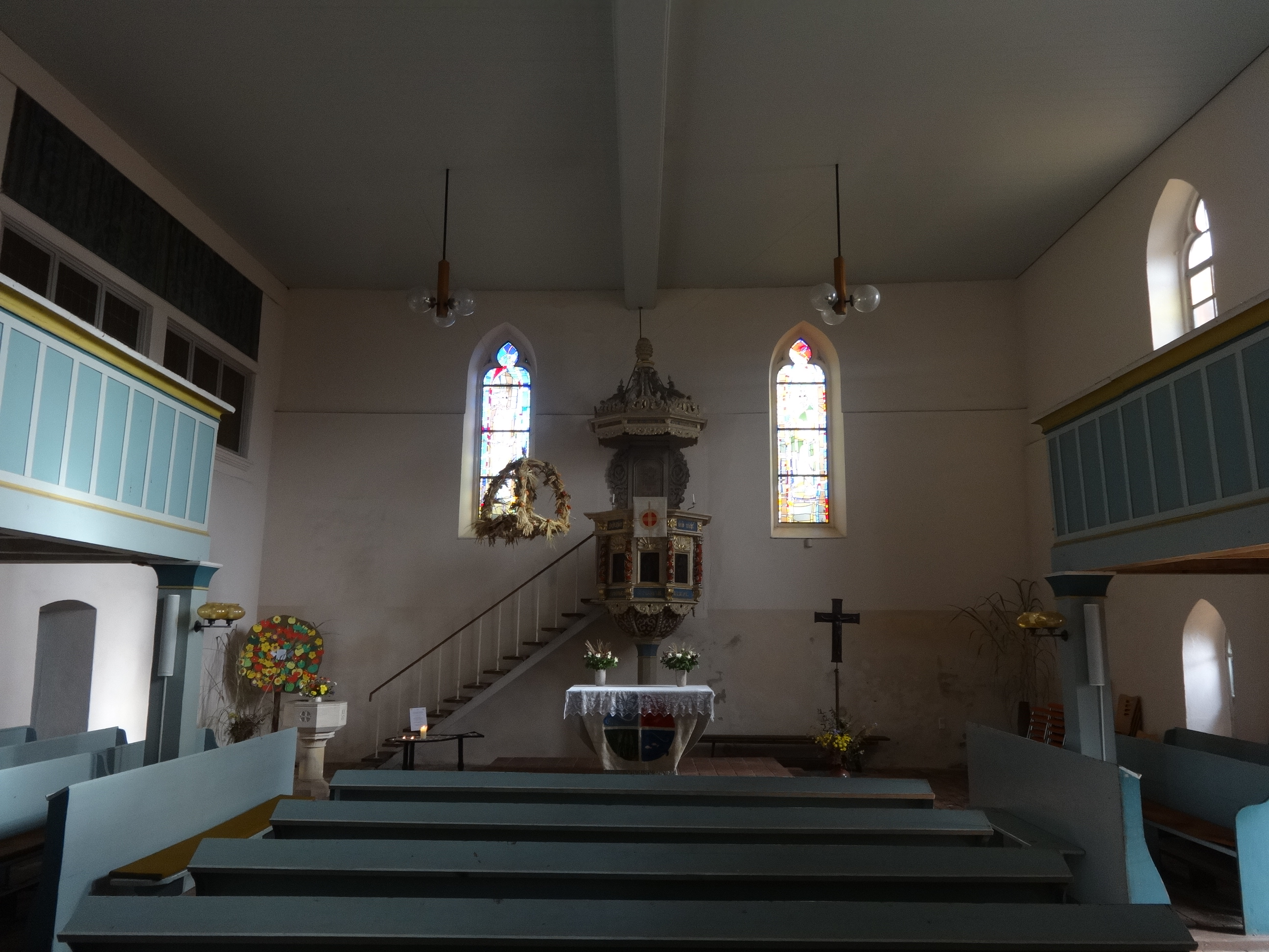 Die evangelische Heilig-Geist-Kirche ist ein Sakralbau aus dem späten 14. Jahrhundert. Sie befindet sich in Teupitz im Landkreis Dahme-Spreewald in Brandenburg. Im Innern befinden sich eine barocke Kanzel aus dem Jahr 1692 sowie eine Orgel von 1694.